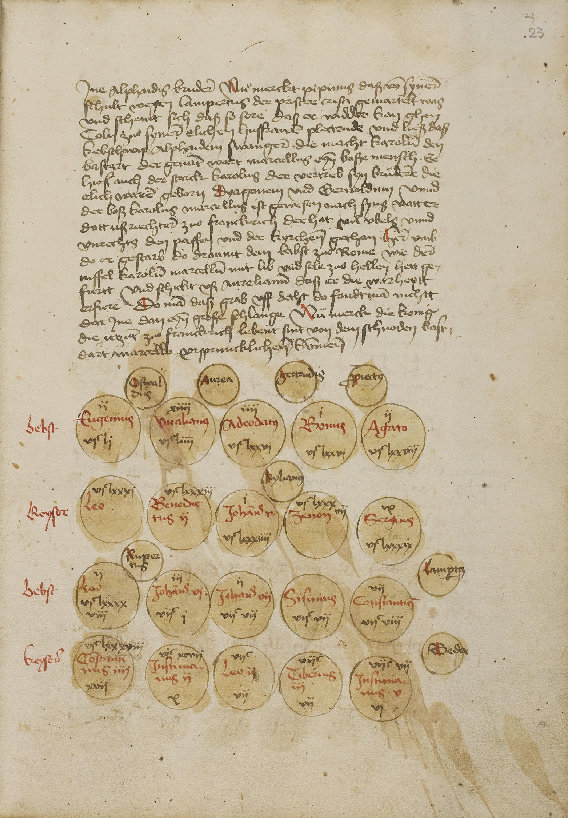 Chronik Friedrichs I., um 1480, Heid. Hs. 3599, Bl. 23r